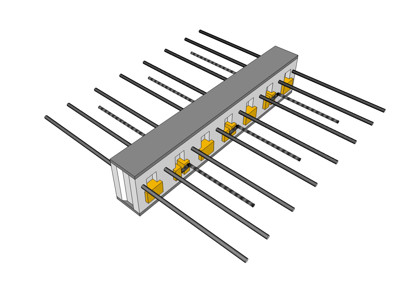 Rupteur à barre pour jonction plancher/balcon